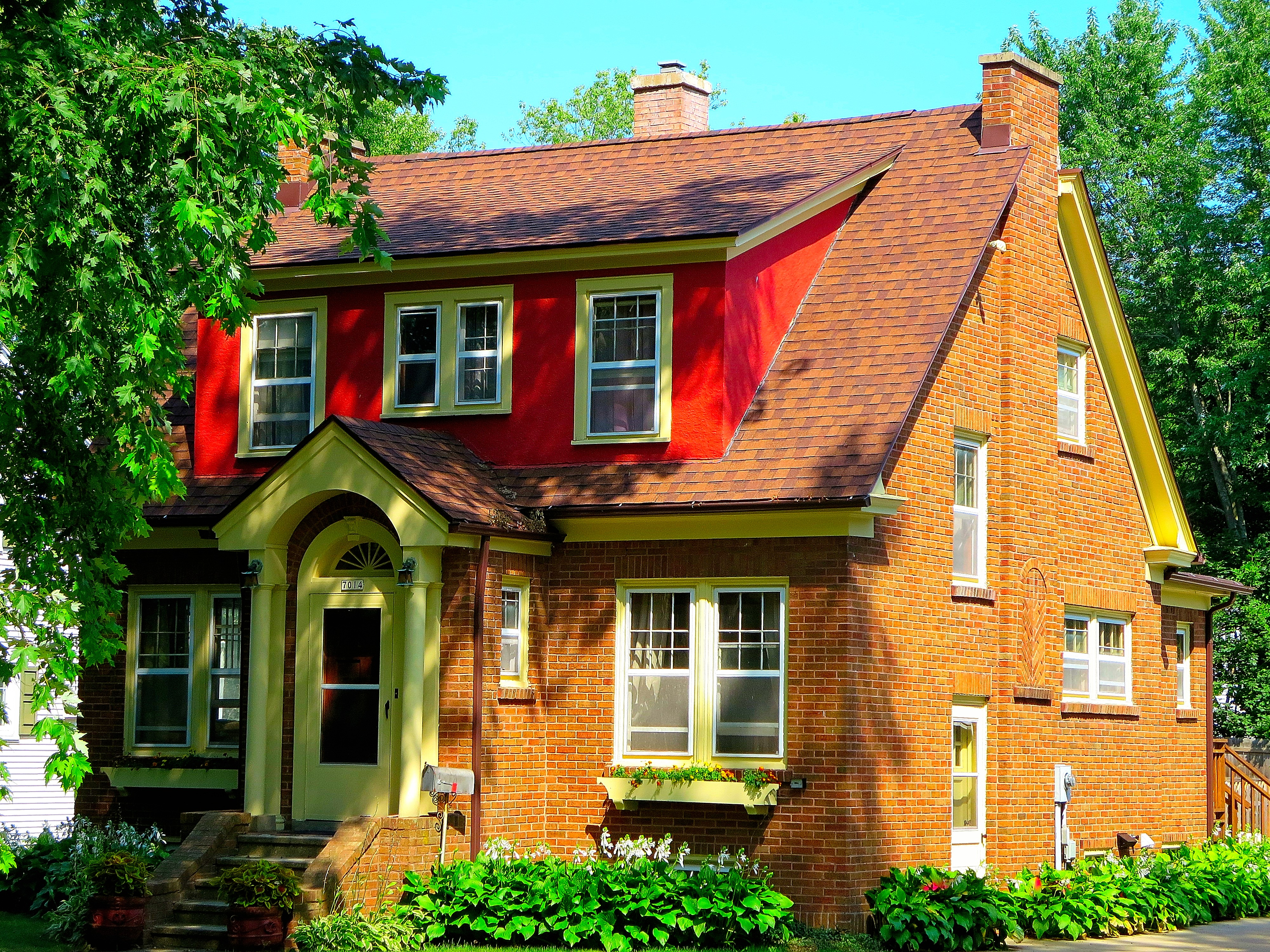 Dr. C.F. Allen House